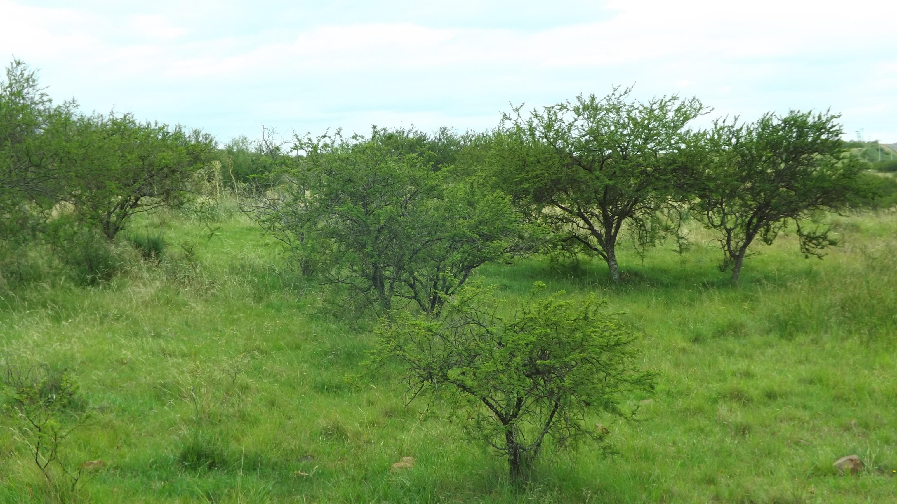 Espinilho - Acacia caven (Mol.) Mol.-Família: Fabaceae - Parque Estadual do Espinilho